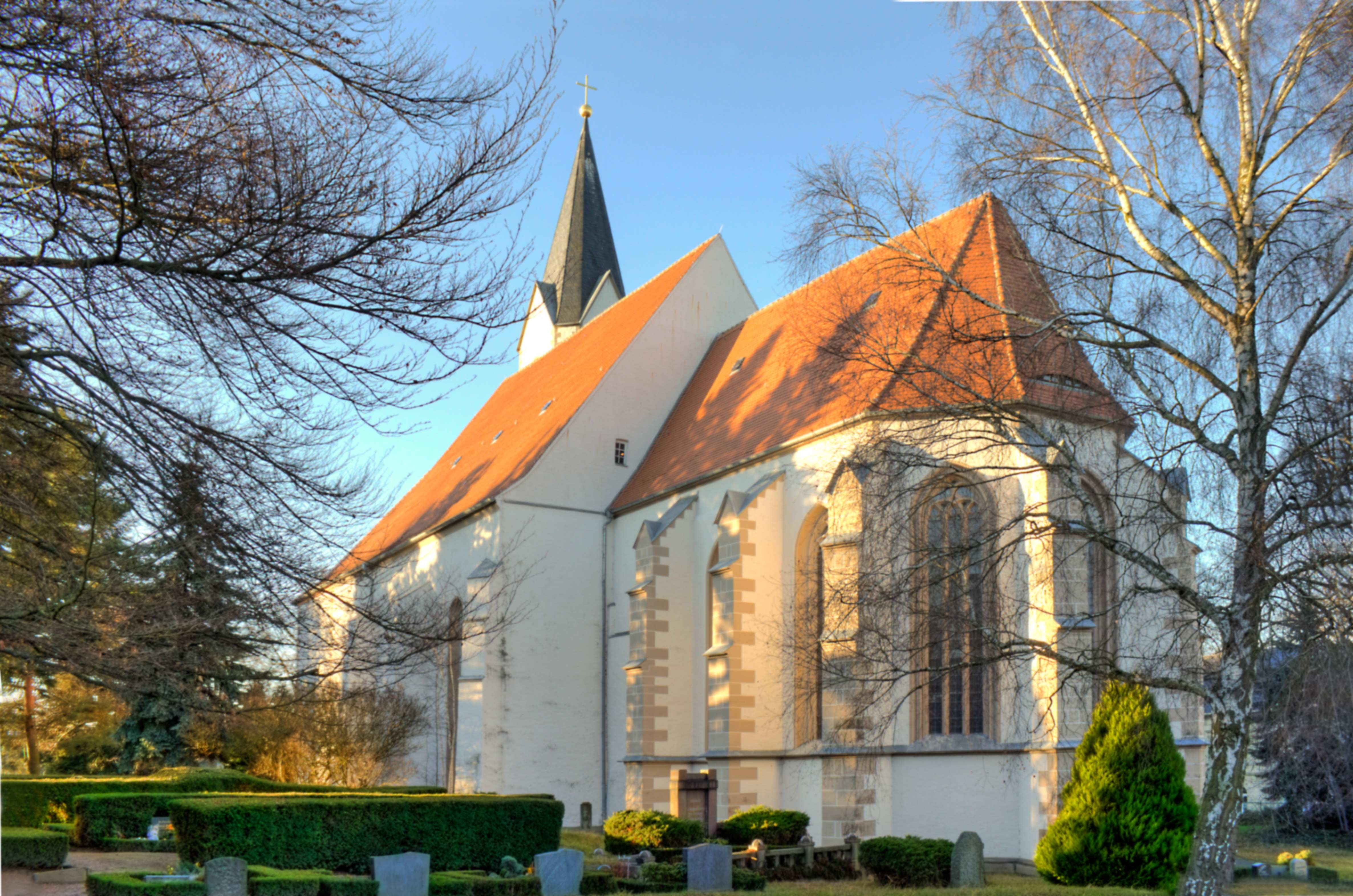 Stadtkirche "Unser Lieben Frauen" Kirchstraße in Dahlen